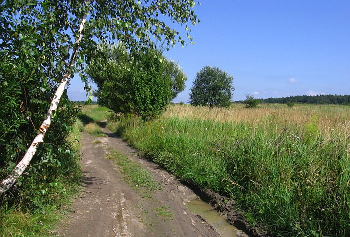 Wypaleniska w Dąbrowie Górniczej